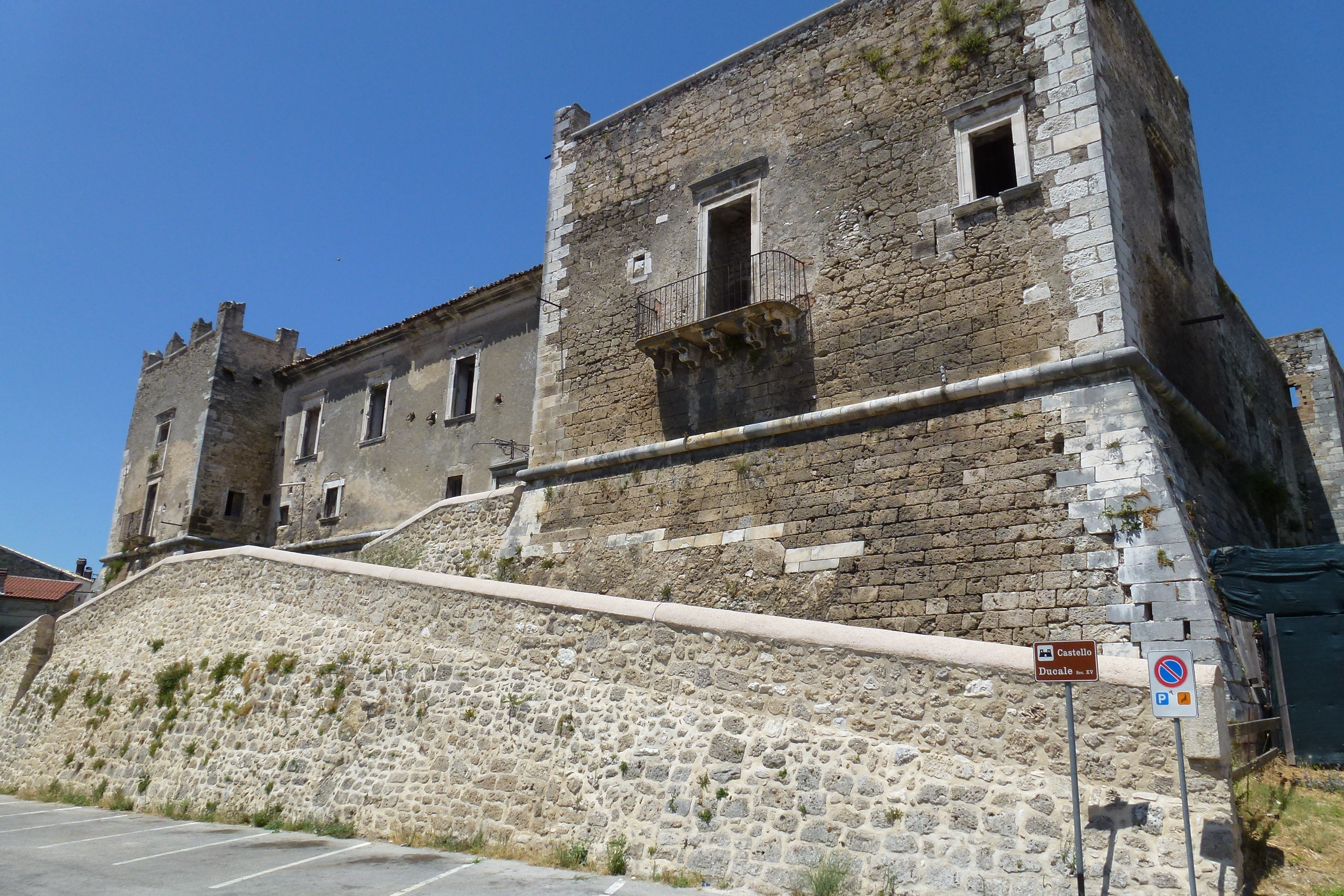 Il Castello